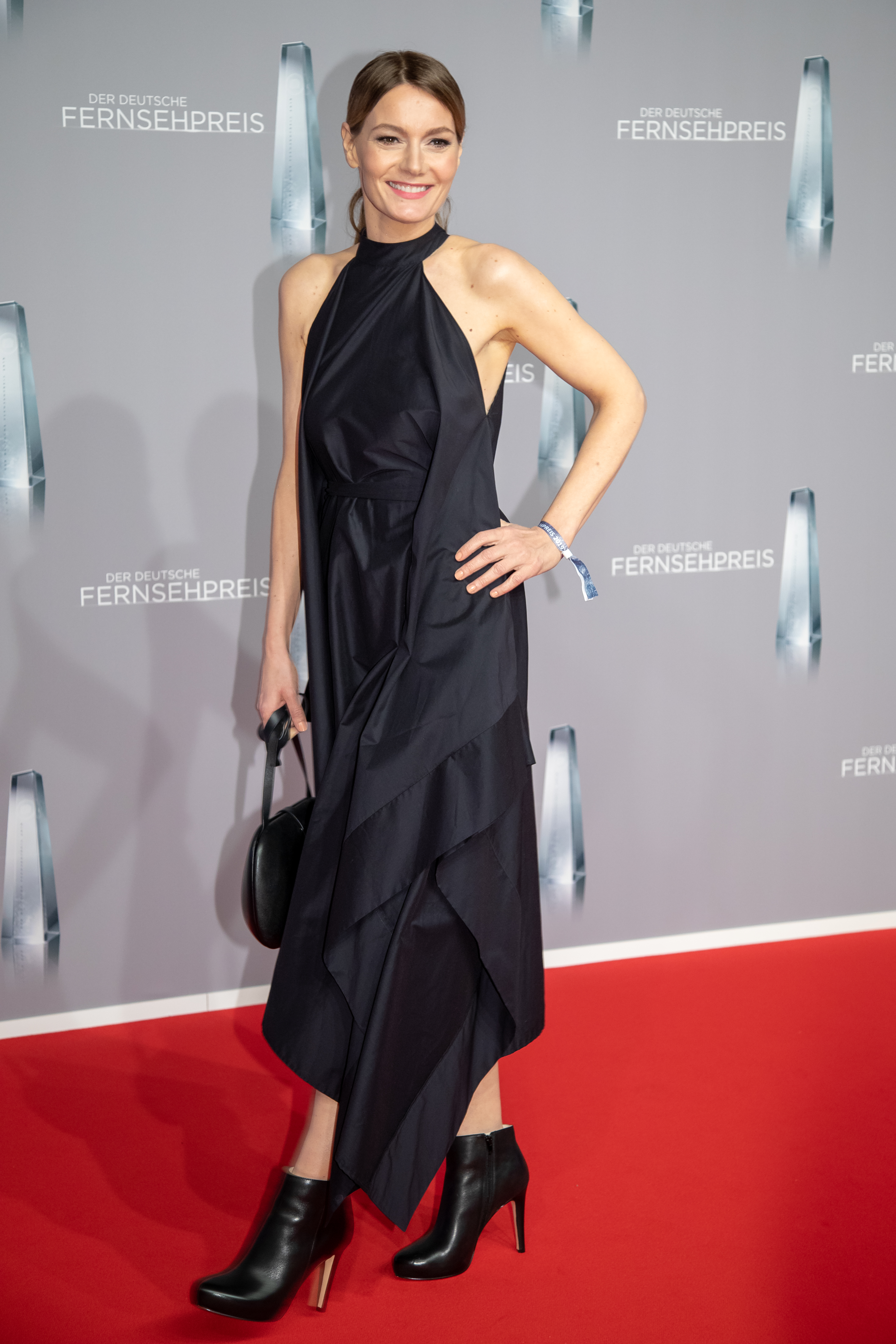 Martina Hill beim Deutschen Fernsehpreis 2019 in der Düsseldorfer Rheinterrasse